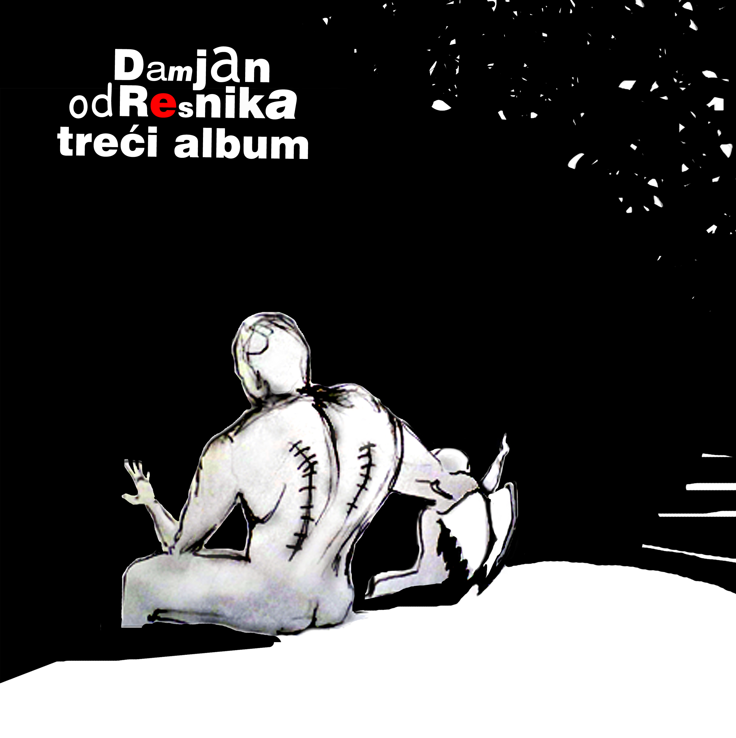 Srpskohrvatski / српскохрватски: Omot trećeg studijskog albuma Damjana od Resnika pod nazivom "Treći album" iz 2013. godine.